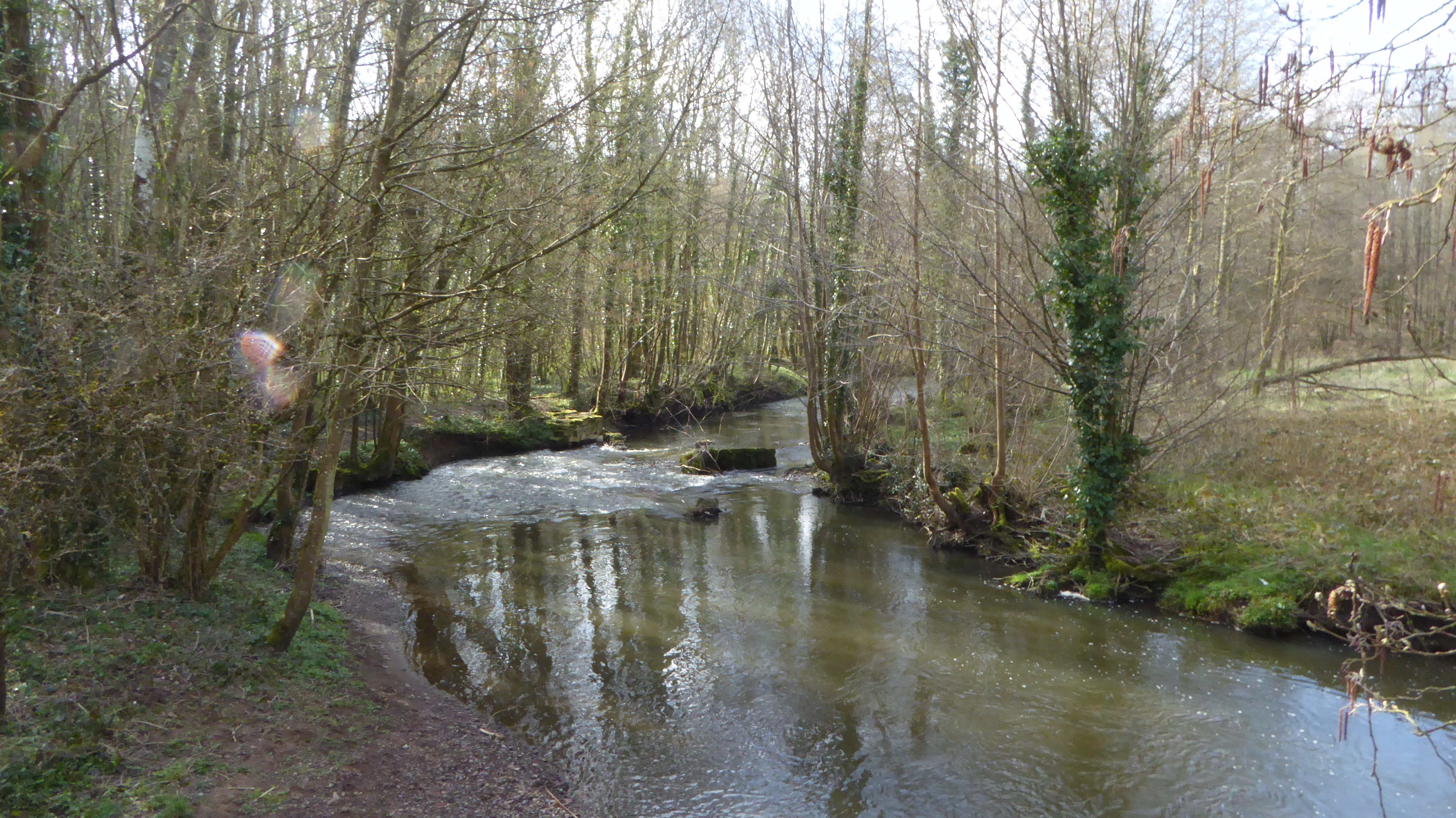 L' Oise vue du GR les forges d'Anor, Nord, France.